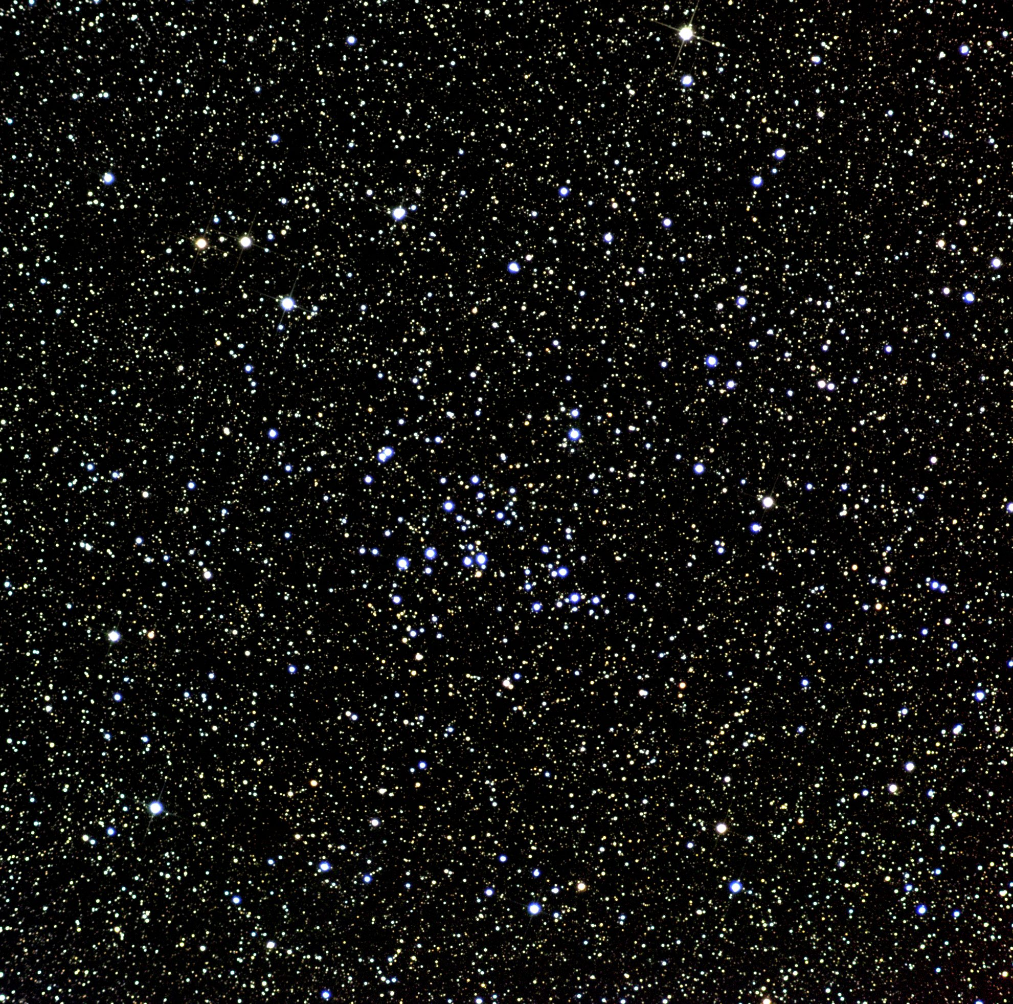 Cladwell 16 - NGC 7243 - image Setge Corrotte